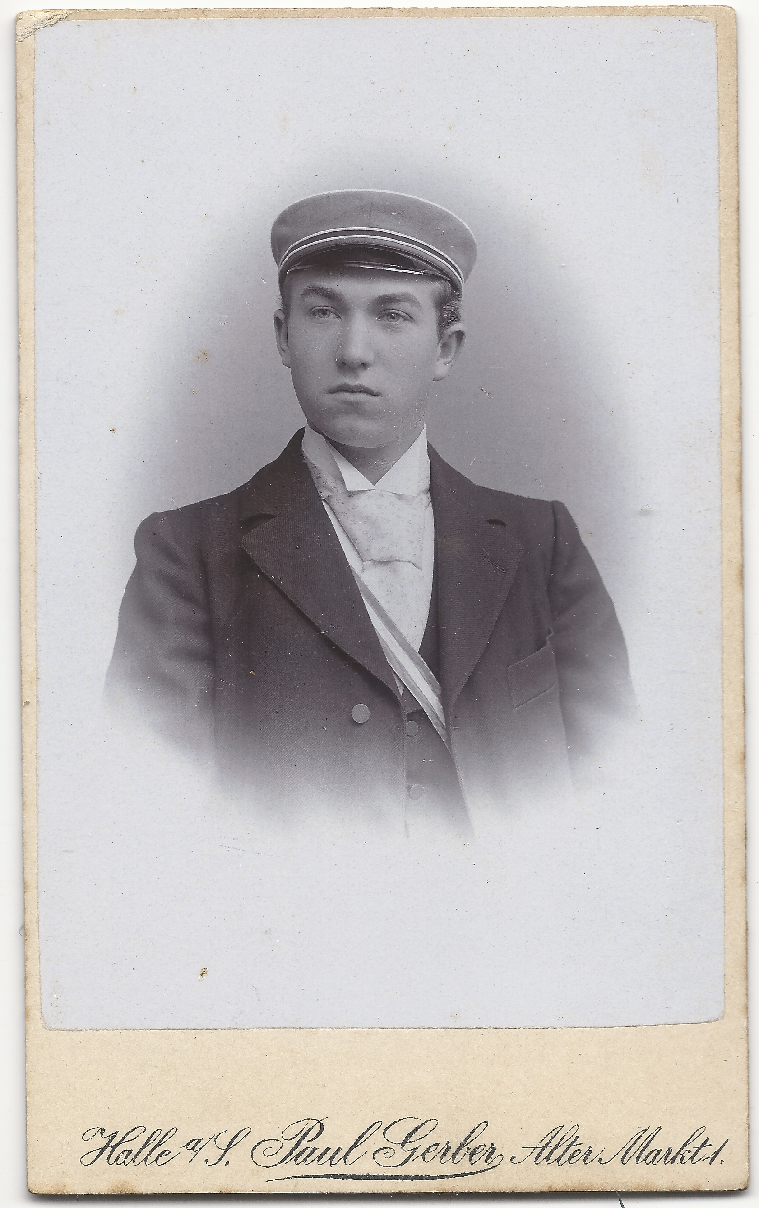 Porträtfotografie von Walter Krostewitz